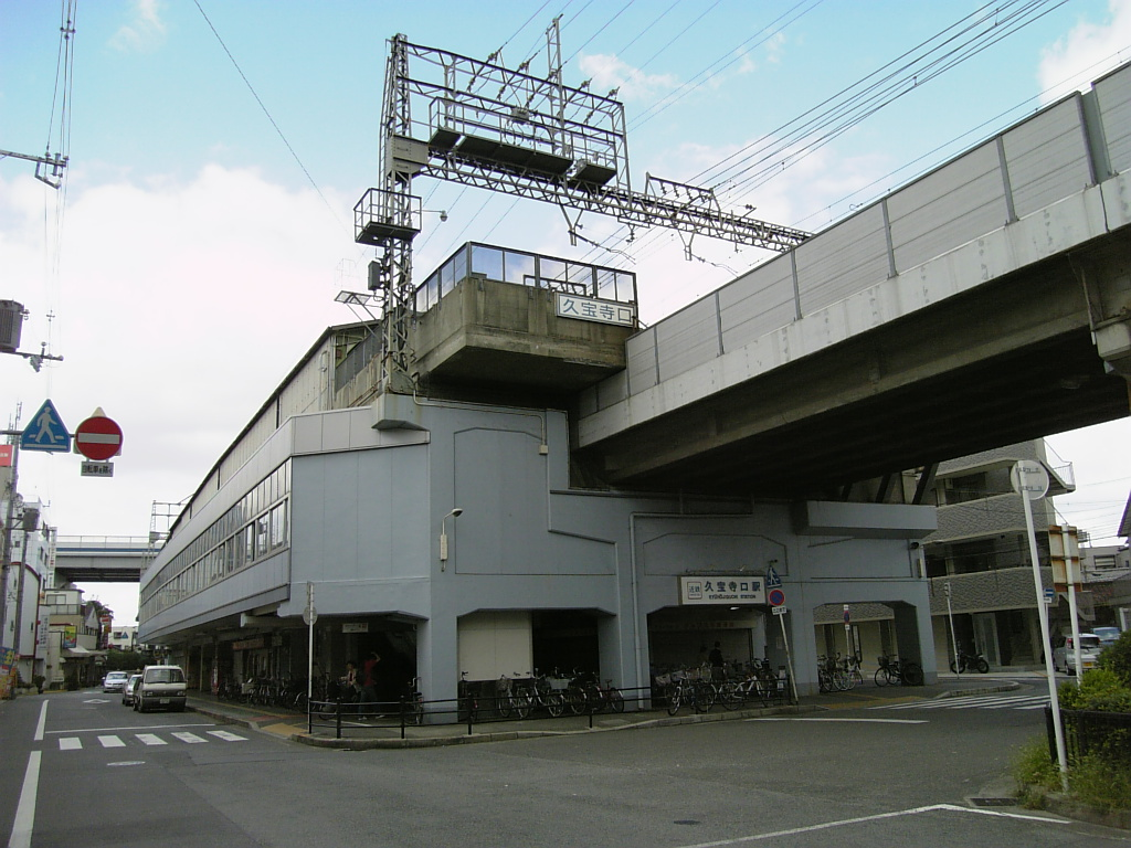 久宝寺駅